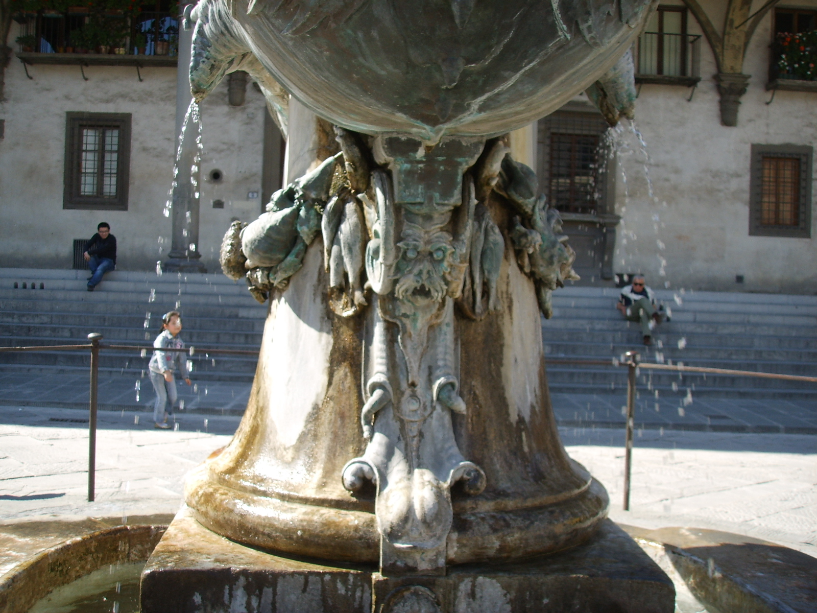 Seconda fontana dei mostri marini